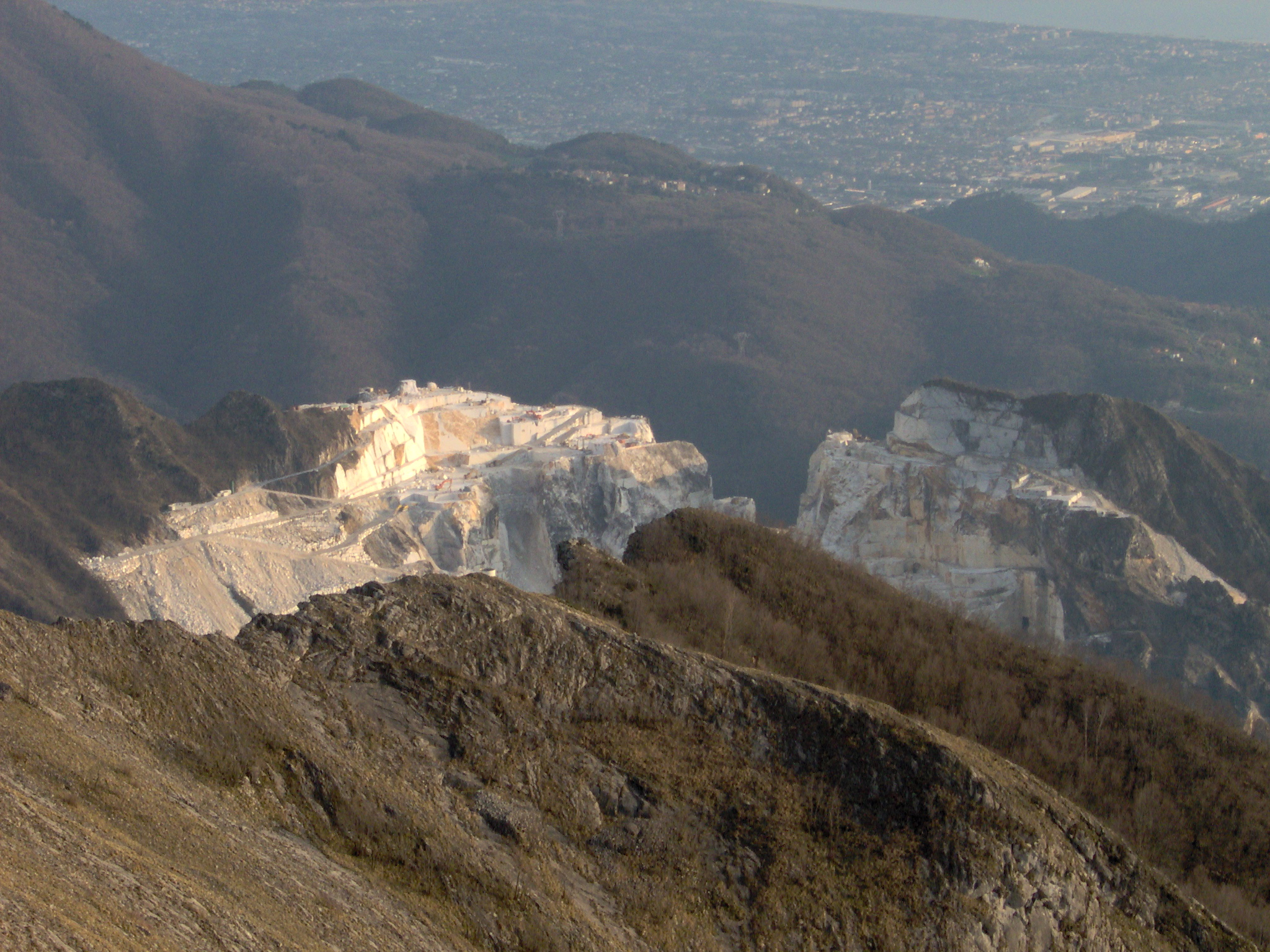 Le cave di marmo viste da Campo Cecina